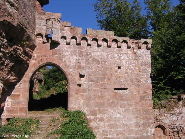 Photo du portail principal du chateau de Schœneck